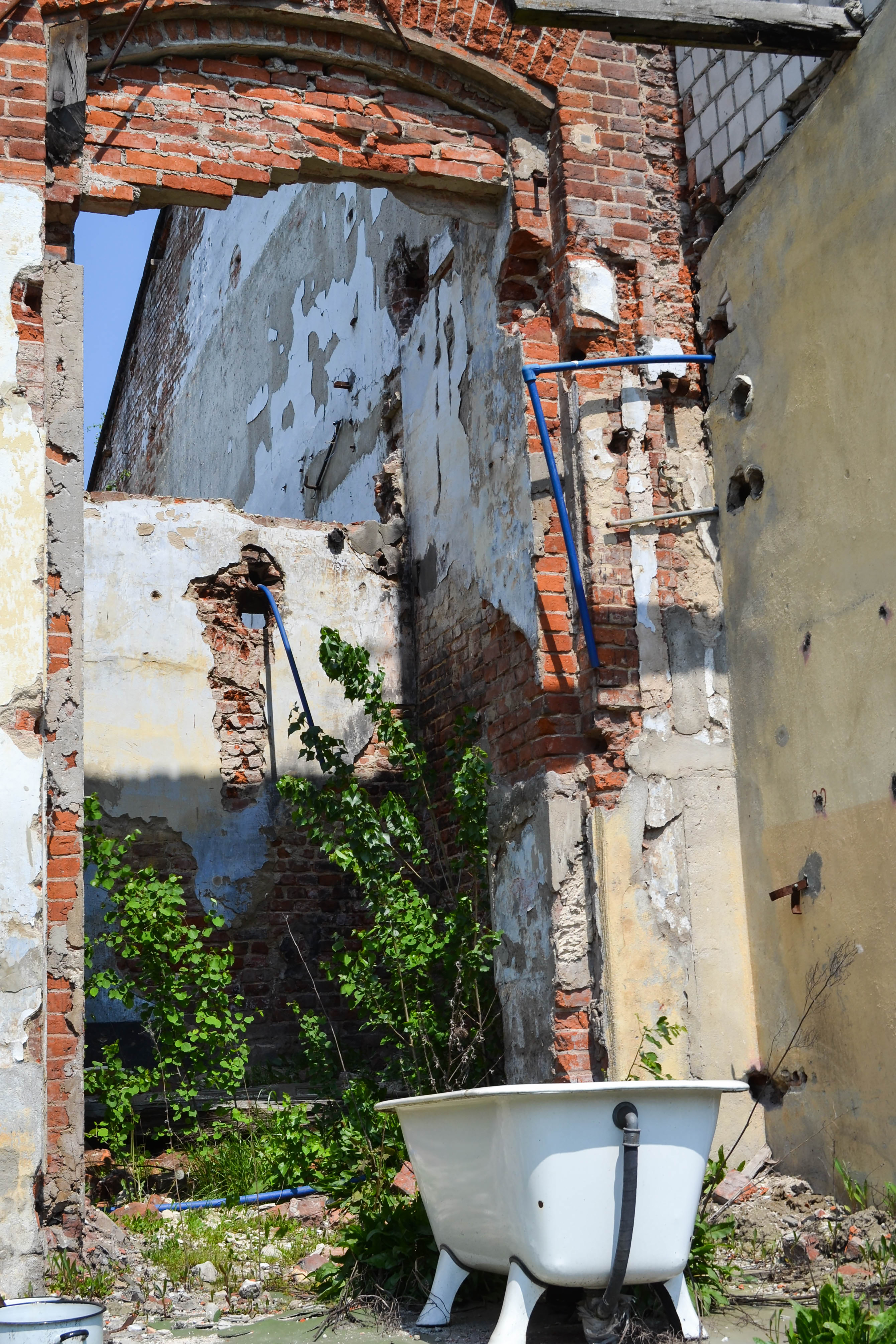 Resztki fabryki Krusche & Ender w Pabianicach przy Grobelnej 8